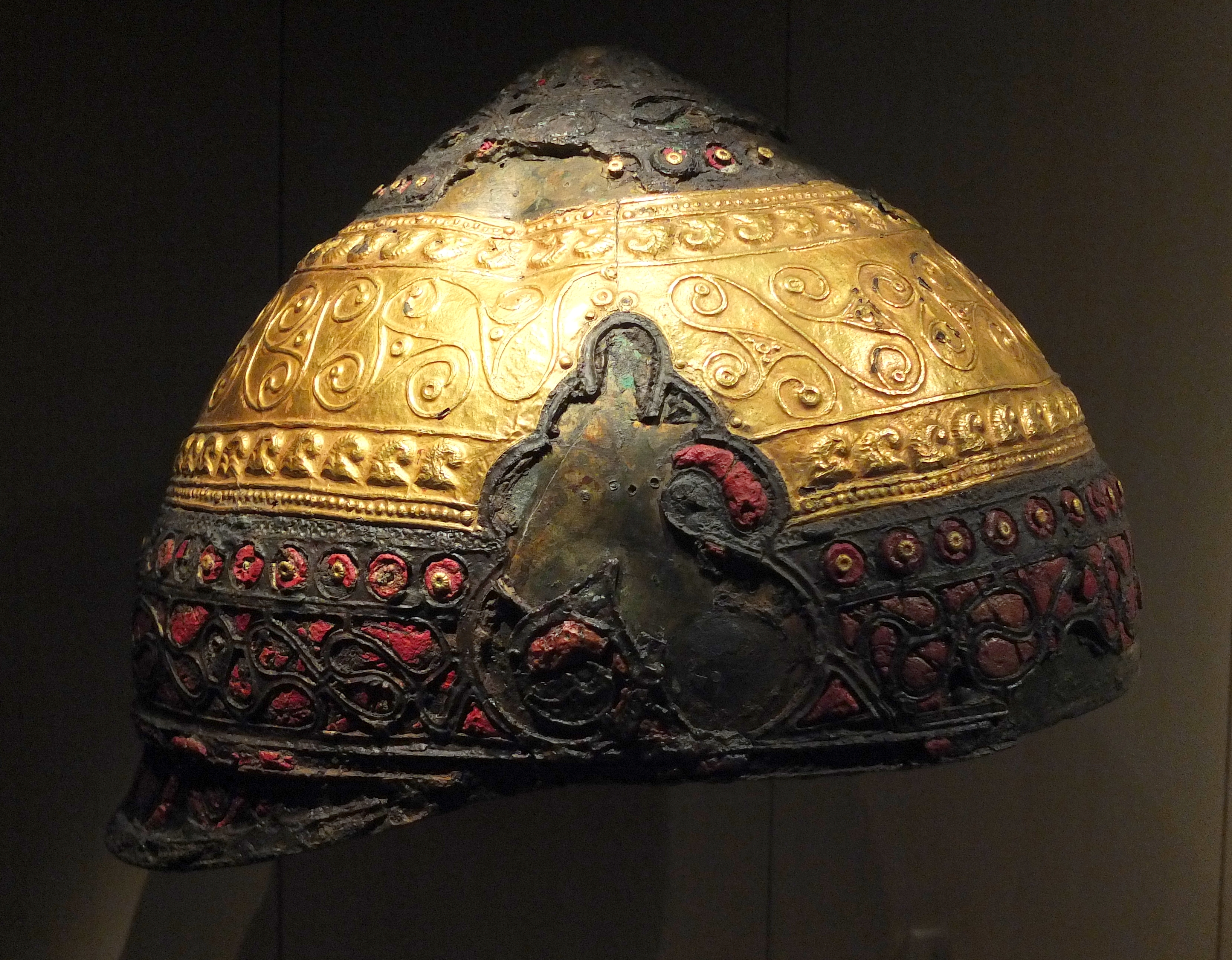 Casque gaulois d'Amfreville-sous-les-Monts (vue latérale), IVe siècle av-JC., bronze, fer, or, émail) - Musée d'archéologie nationale de Saint-Germain-en-Laye (Yvelines). Dépôt du musée du Louvre ML2153